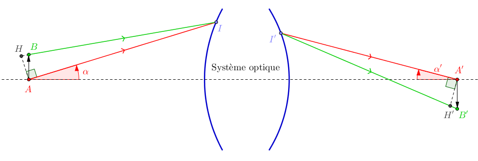 Illustration pour la démonstration de la relation des sinus d'Abbe.